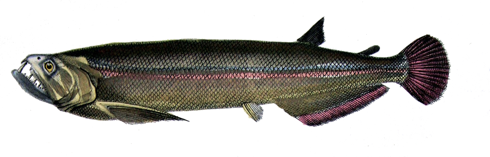 Rhaphiodon vulpinus